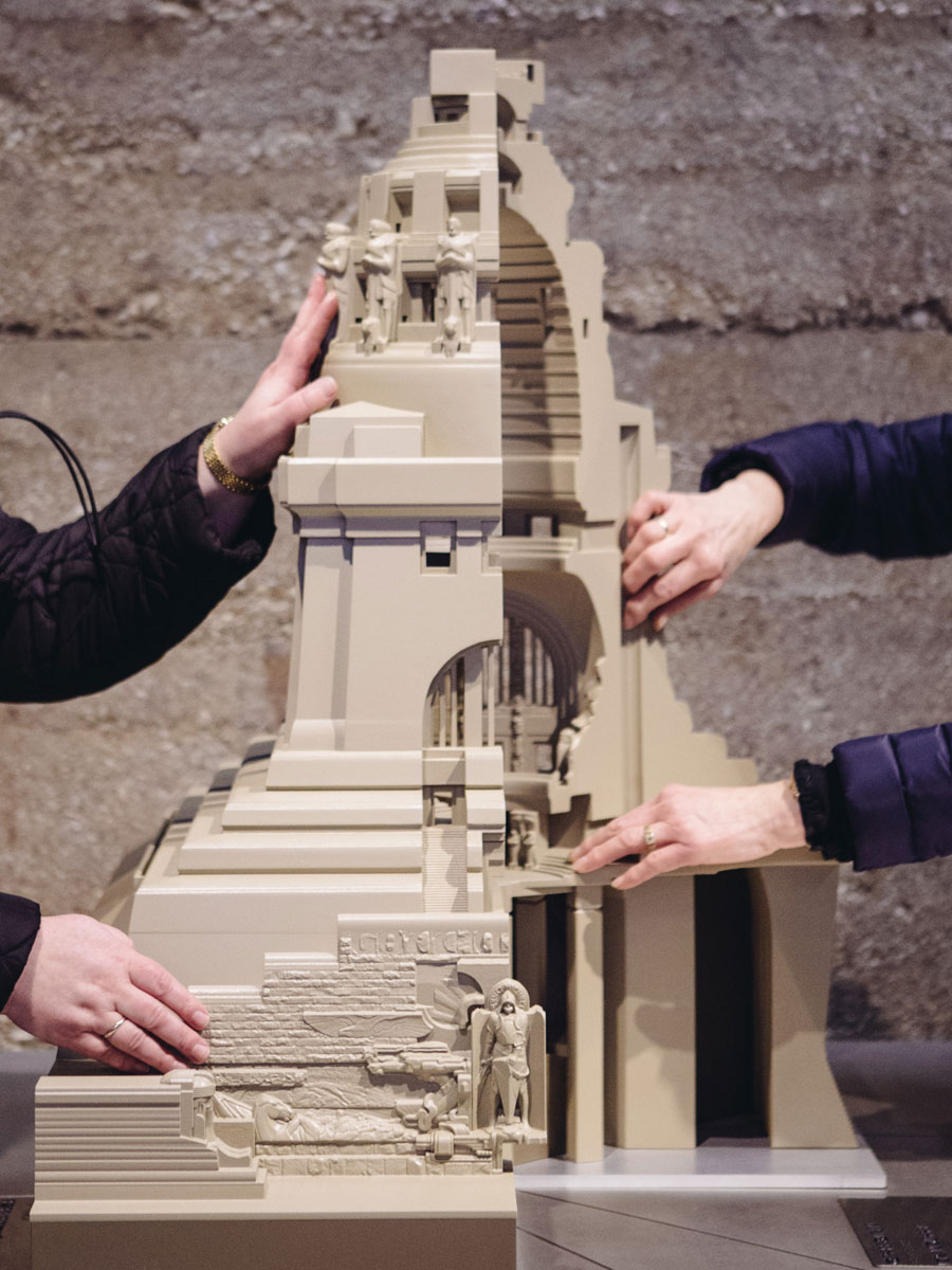 3D Druck Modell des Völkerschlachtdenkmals als Tastmodell für Blinde und Sehbehinderte © Rapidobject GmbH